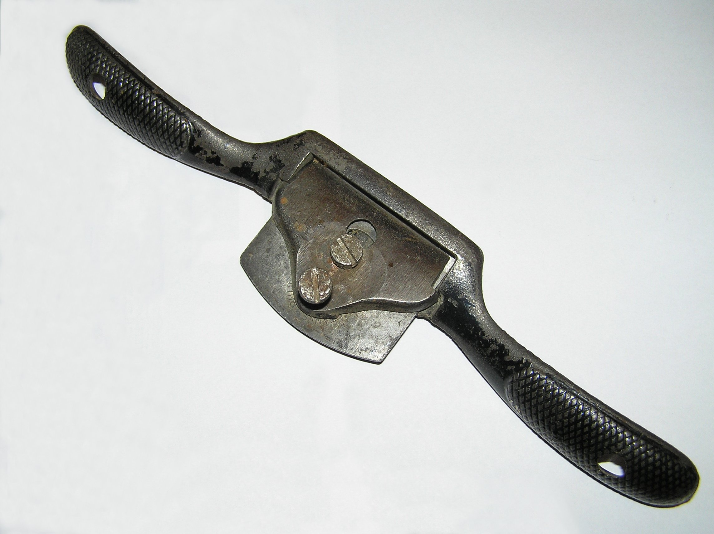 Pääsuhöövel